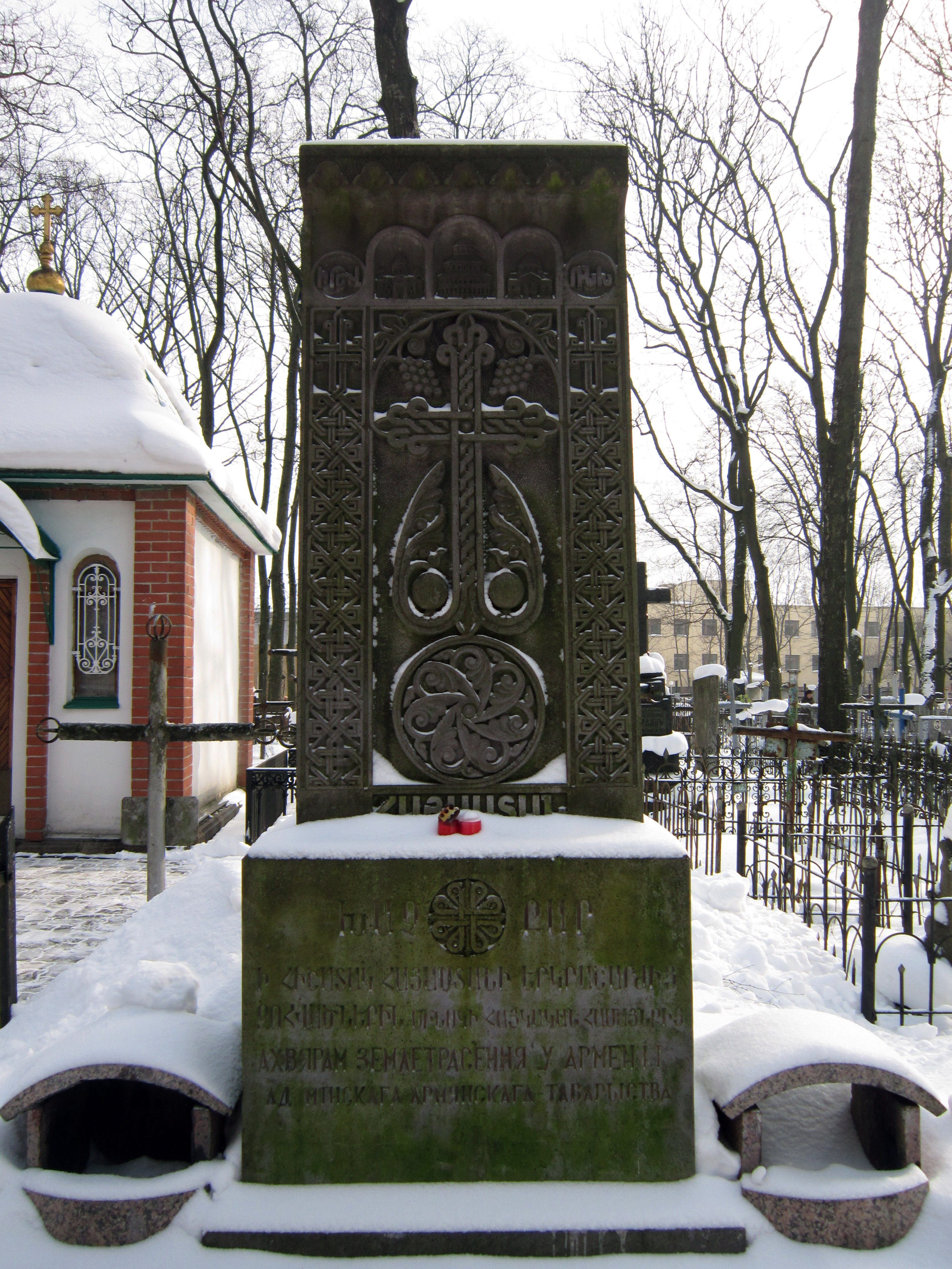 Хачкар в память о жертвах геноцида армян в Османской империи и землетрясения в Спитаке. Военное кладбище, Минск.